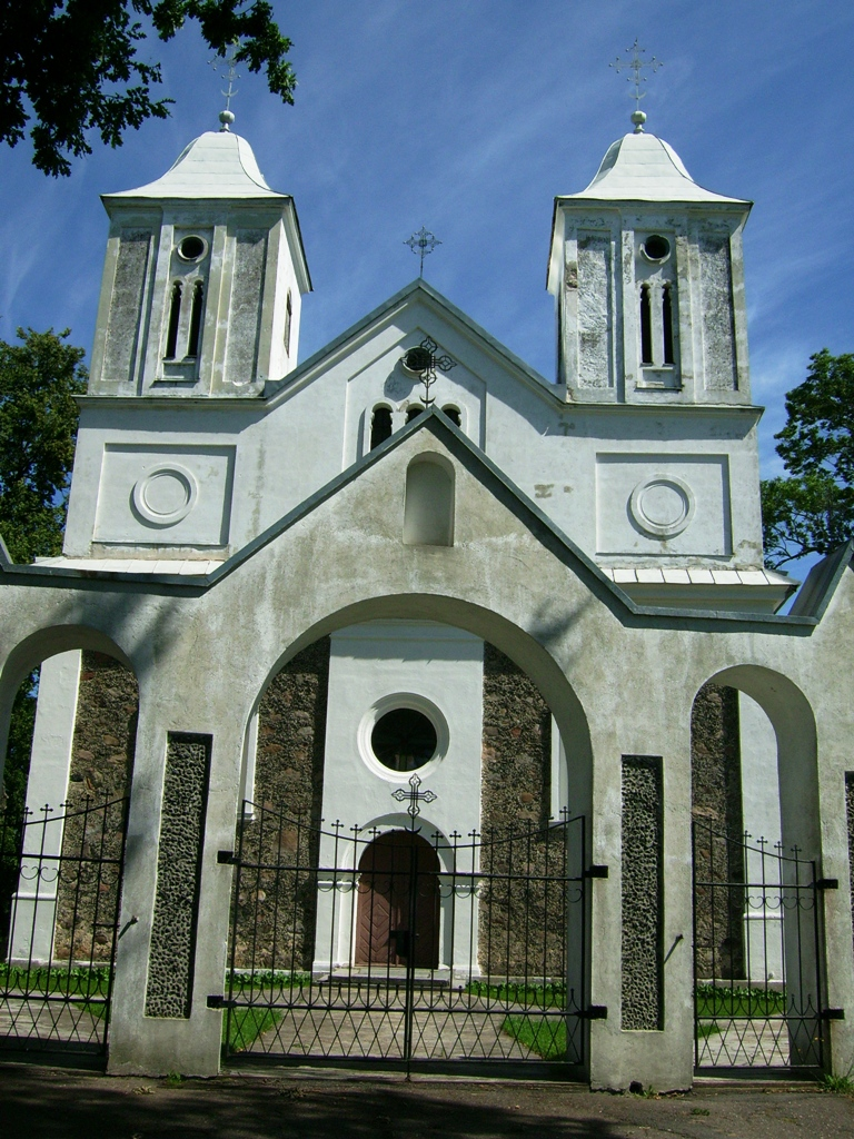 Vainuto bažnyčia